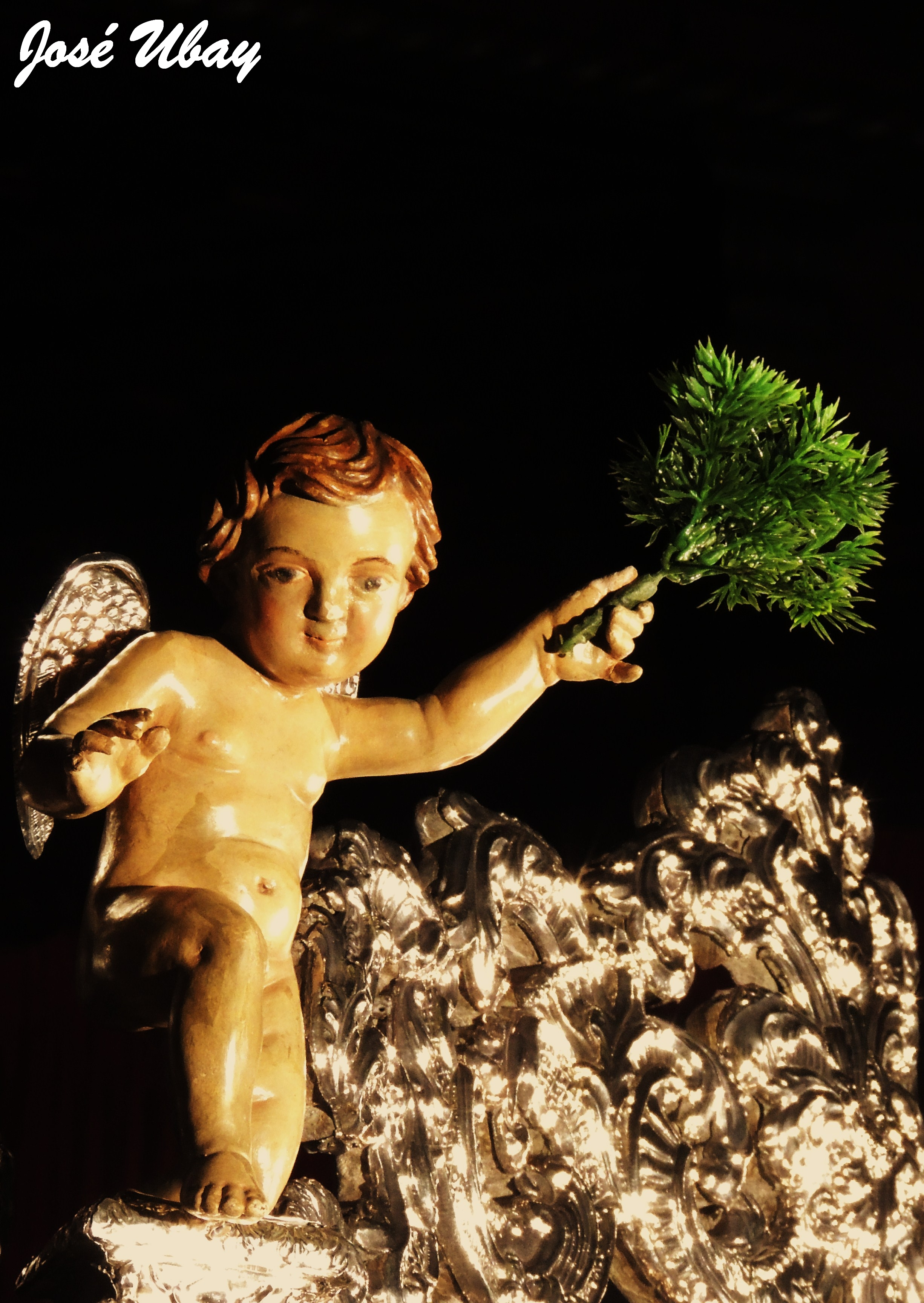 Ángel del baldaquino de Nuestra Señora del Pino. Anónimo. Siglo XVIII. Basílica de Nuestra Señora del Pino. Villa Mariana de Teror, Gran Canaria.